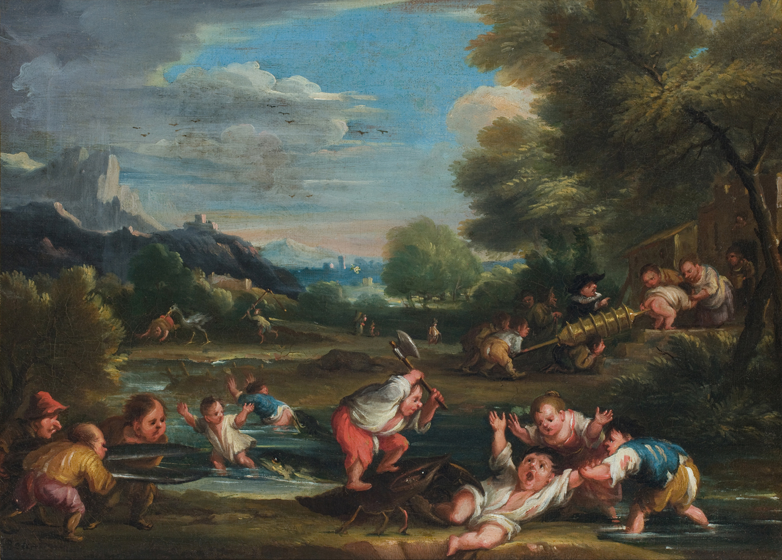 Nano assalito da un gambero e soccorso dai compagni